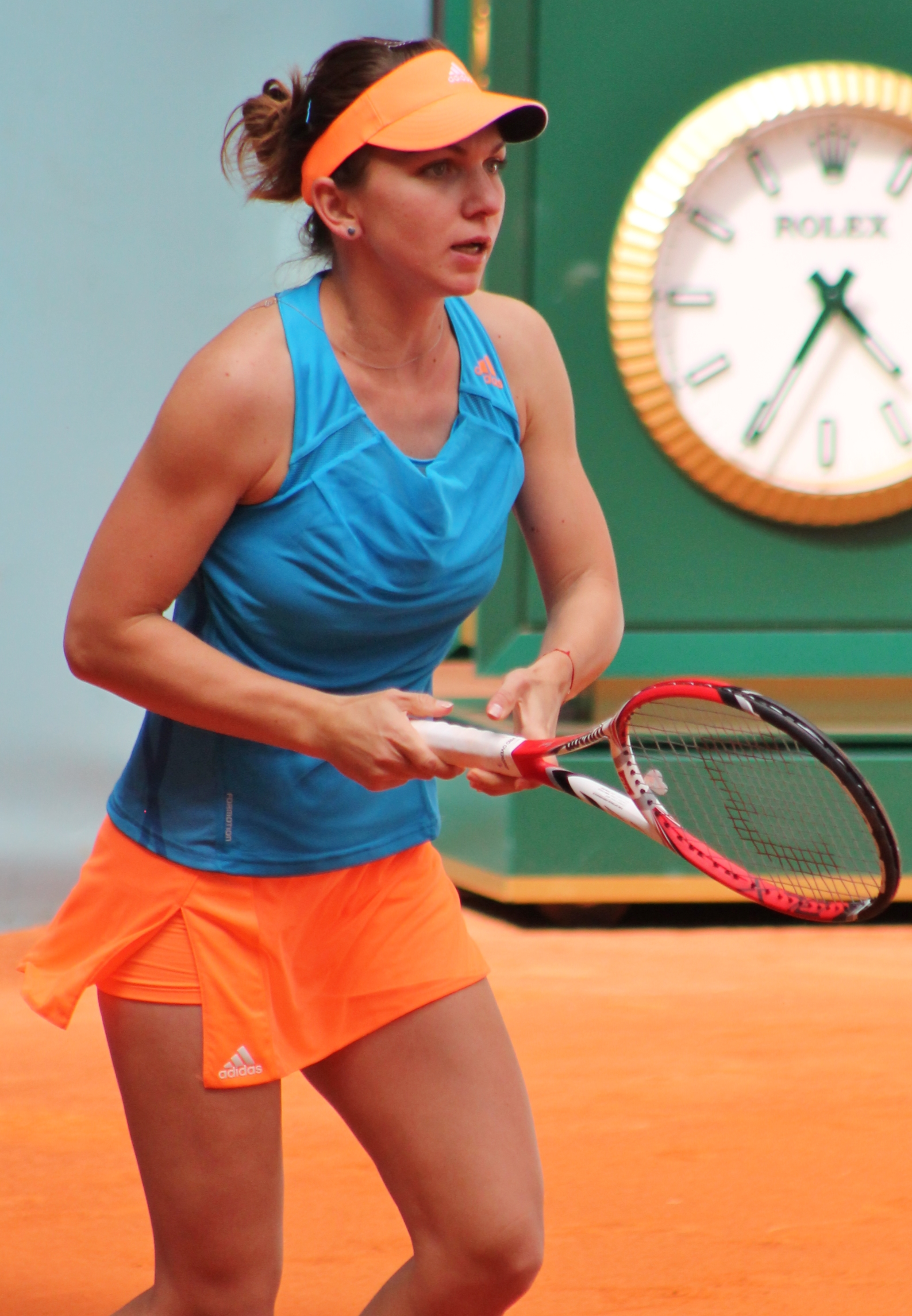 Simona Halep, Madrid 2014